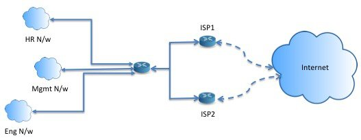 Монгол: Зураг 1